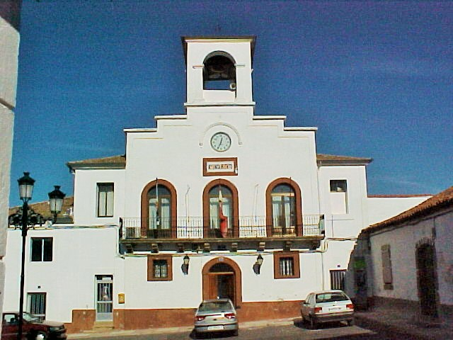 Ayuntamiento de Abadía-Cáceres